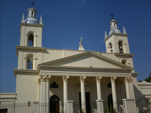 Ciudad de Corrientes, Argentina.